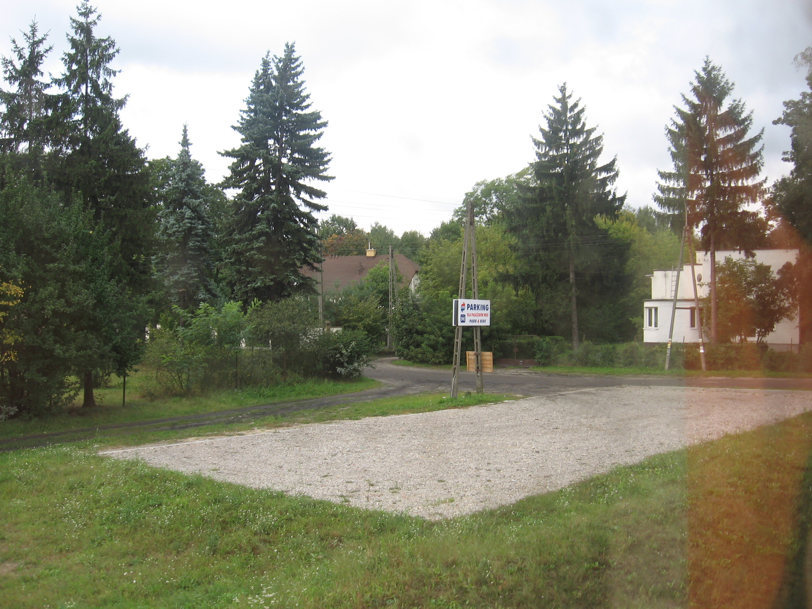 Parking lot at Grodzisk Mazowiecki Okrezna commuter train stop